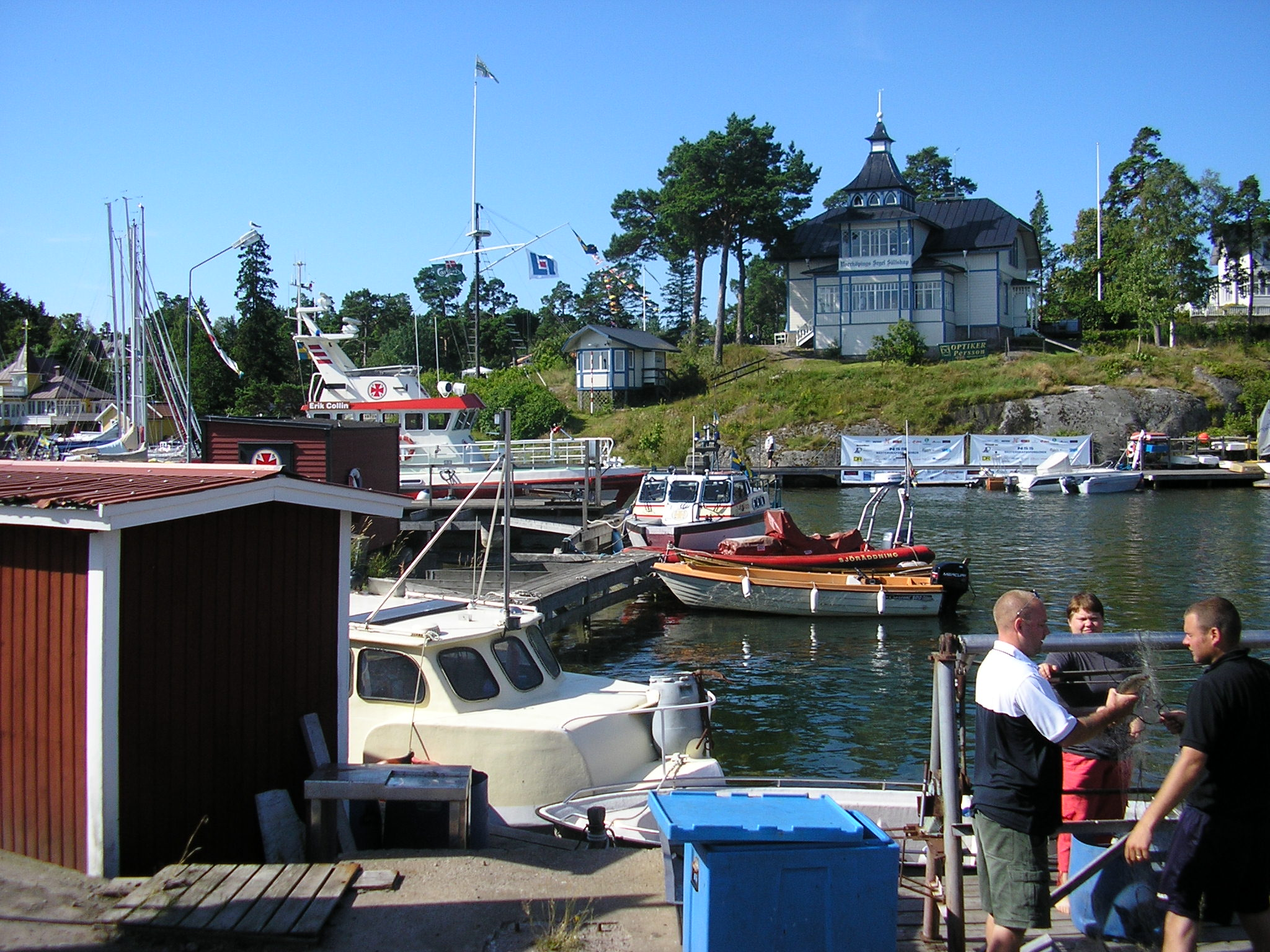 En liten del av Arkösunds hamn med svenska Sjöräddningssällskapets båtar i bild och Norrköpings segelsällskaps klubblokal i bakrunden.